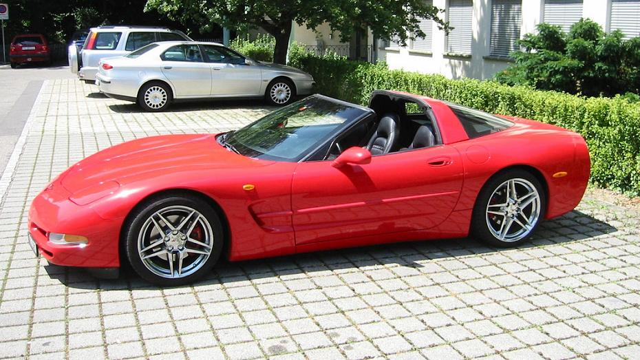 Corvette C5 mit herausgenommenem Targadach